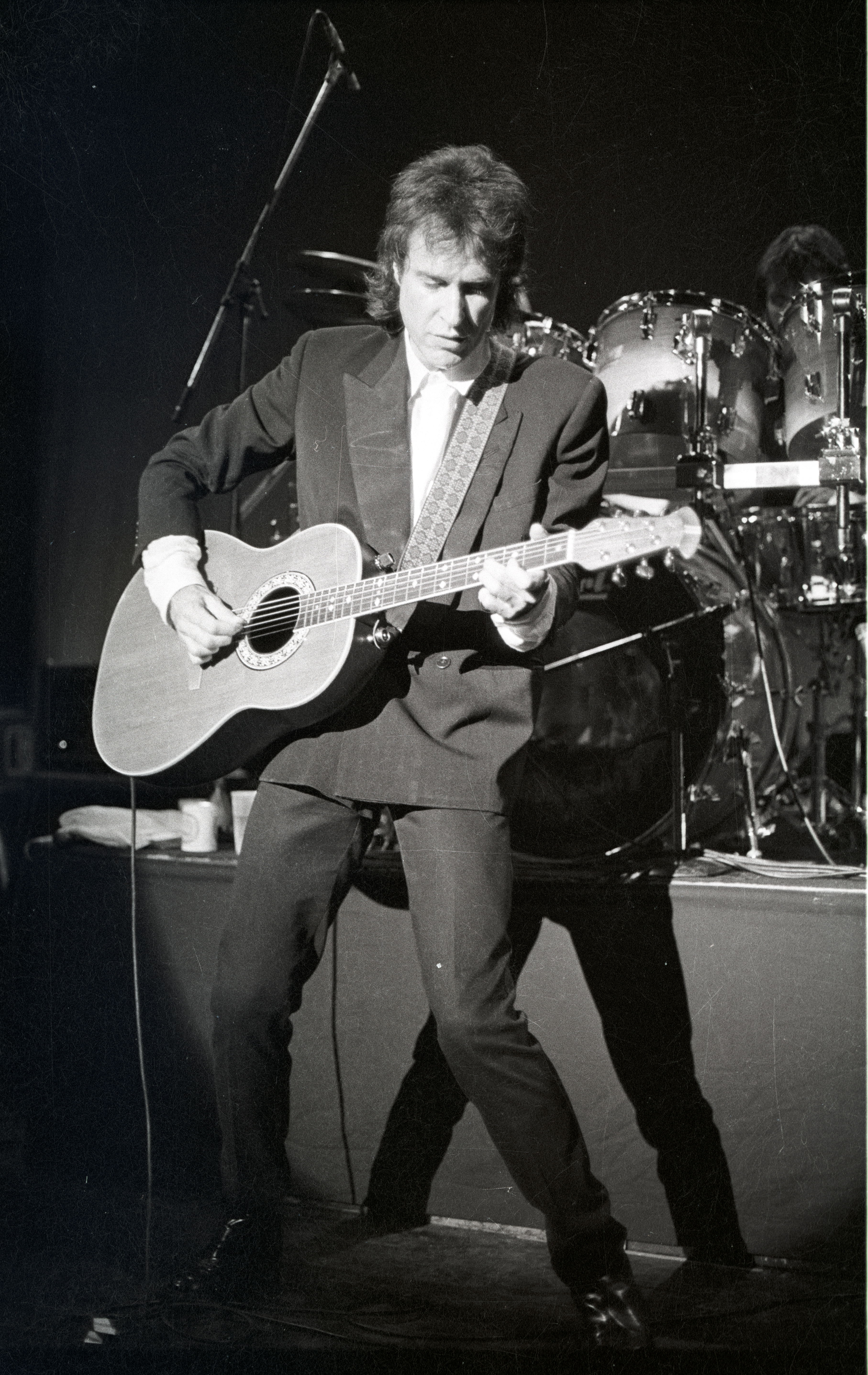 Koninklijk Circus - Brussels - 1985